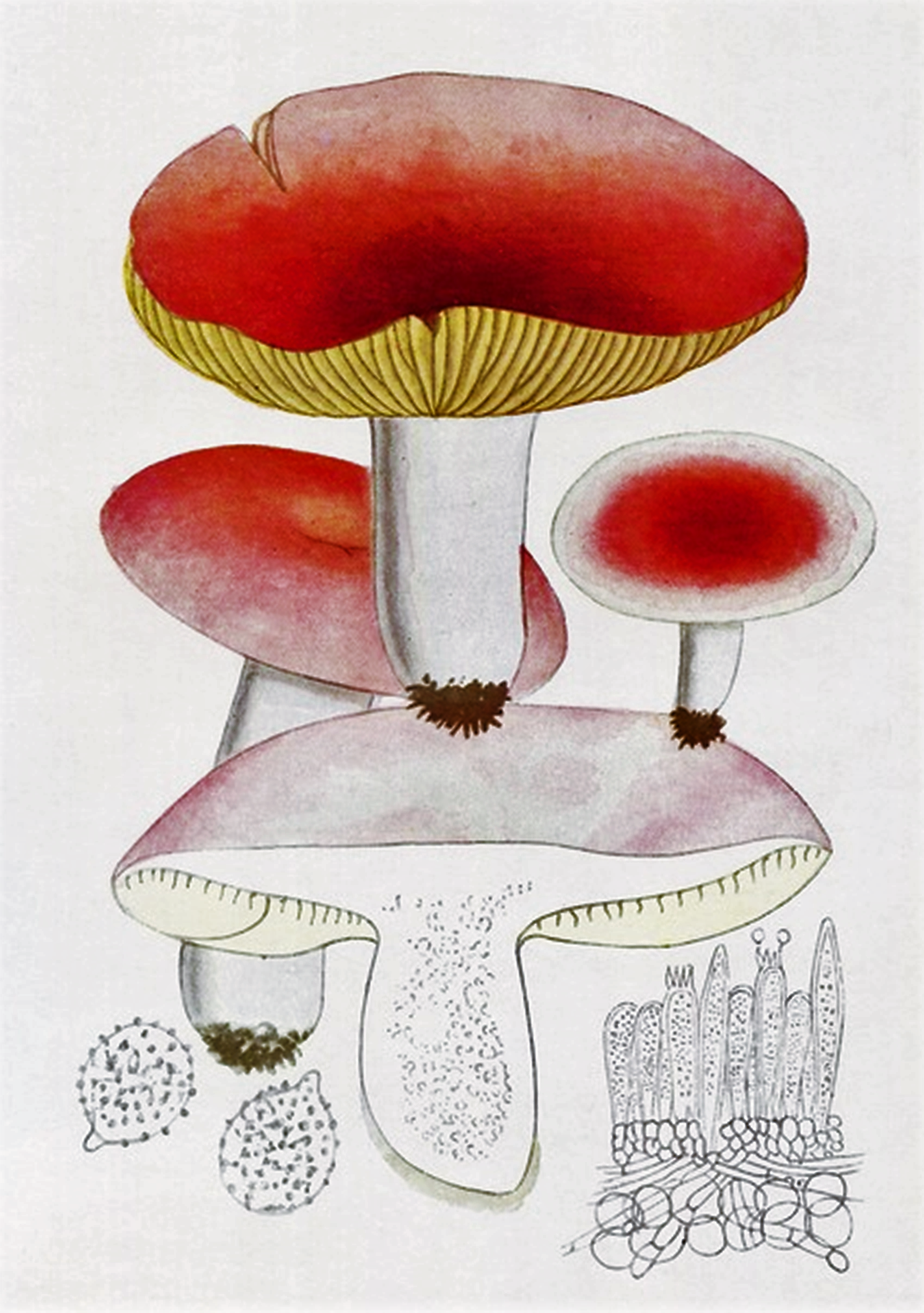 Giacomo Bresadola: Russula rubra (Krombh.) Bres. (1929)[1][2]